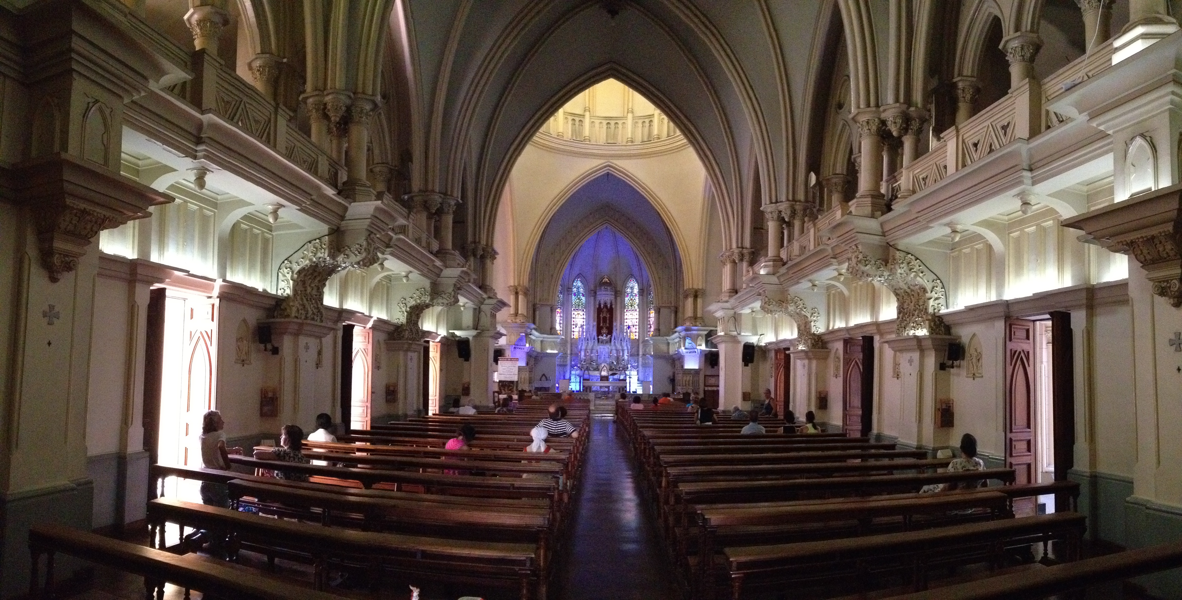 Paróquia Nossa Senhora da Boa Viagem (interior), Belo Horizonte MG